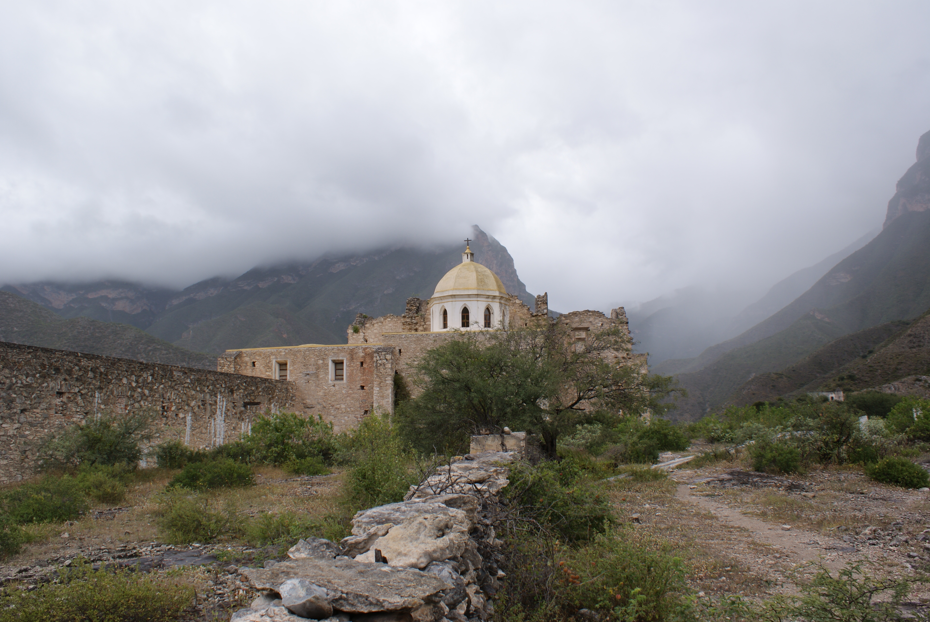 Vista trasera del antiguo templo y claustro de Bucarely en la sierra gorda de Queretaro.